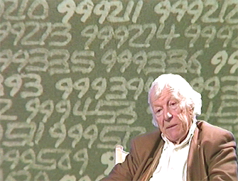 Portrait de Roman Opalka